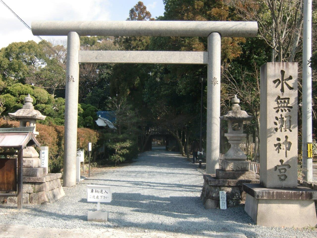 水無瀬神宮